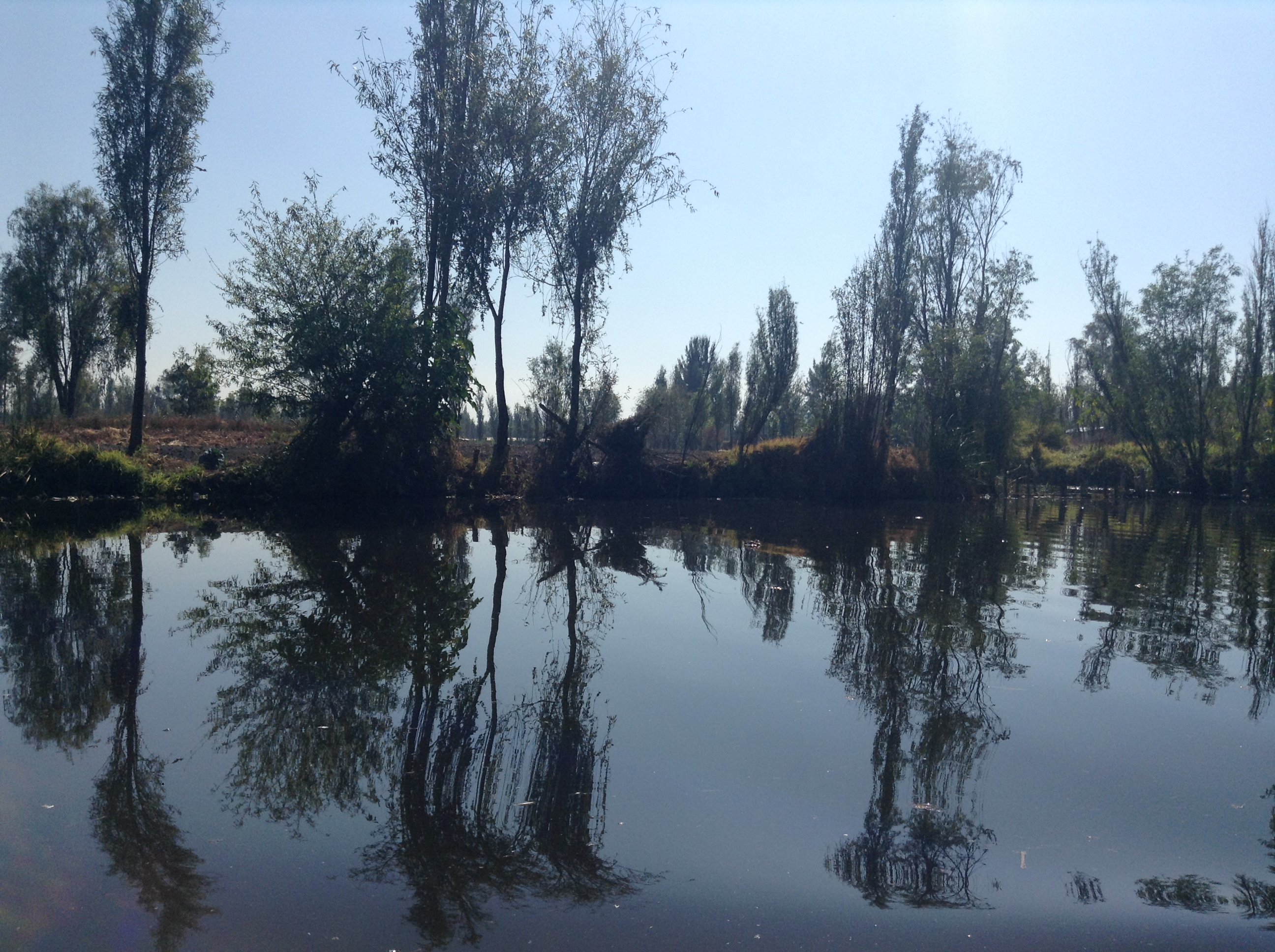 Lago perteneciente a Xochimilco.